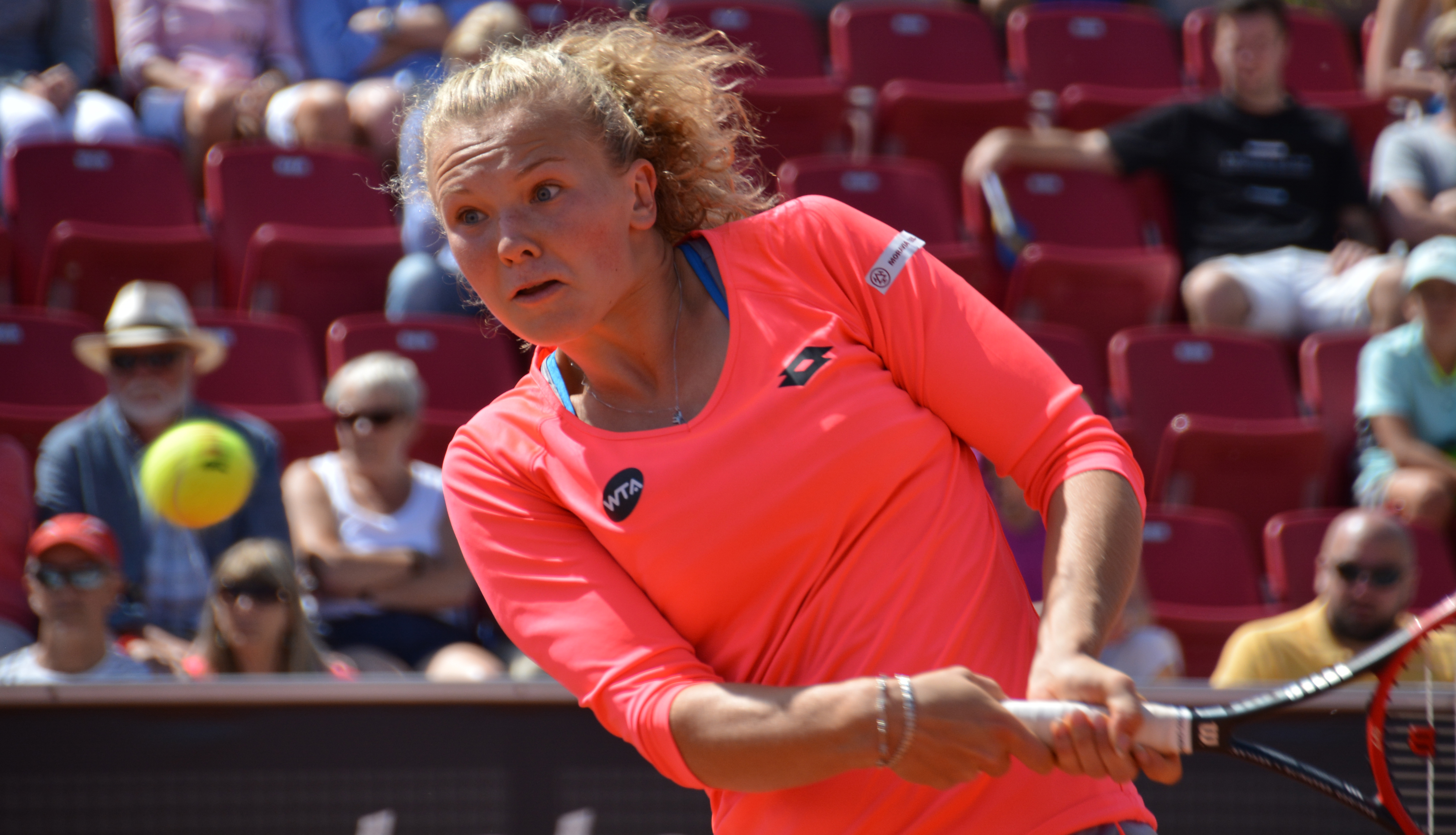 WTA Båstad 2015